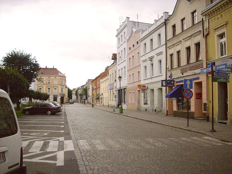 Kąty Wrocławskie. Fragment rynku.